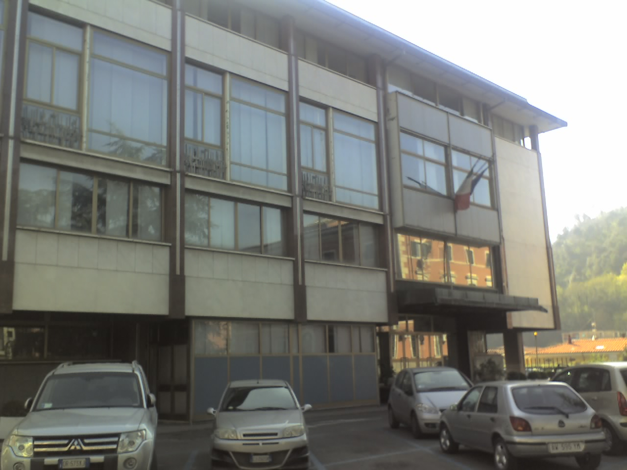 Camera di Commercio di Carrara